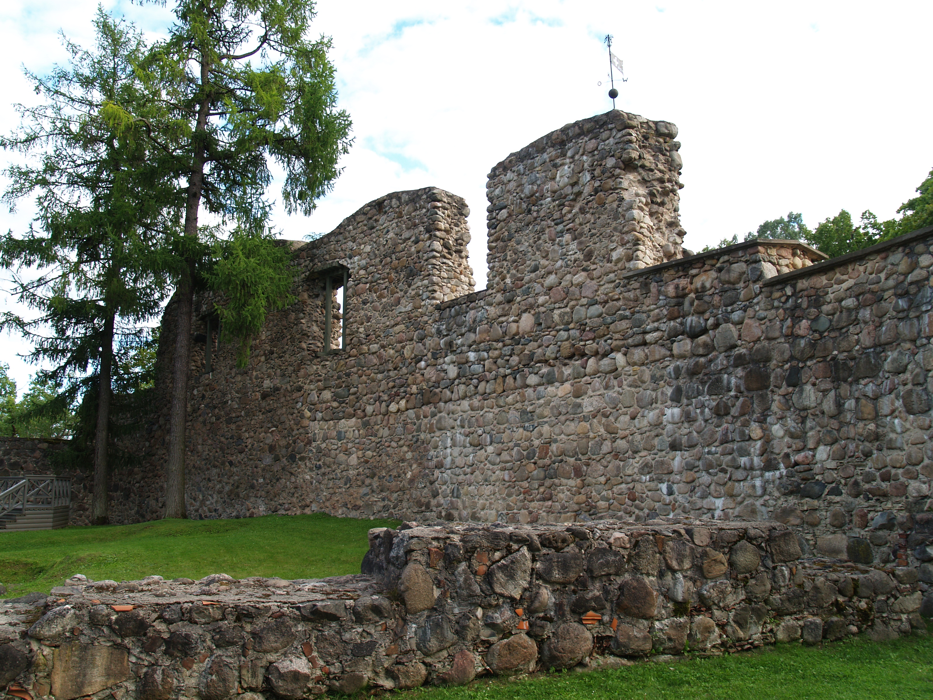 Valmiera linnusevaremed